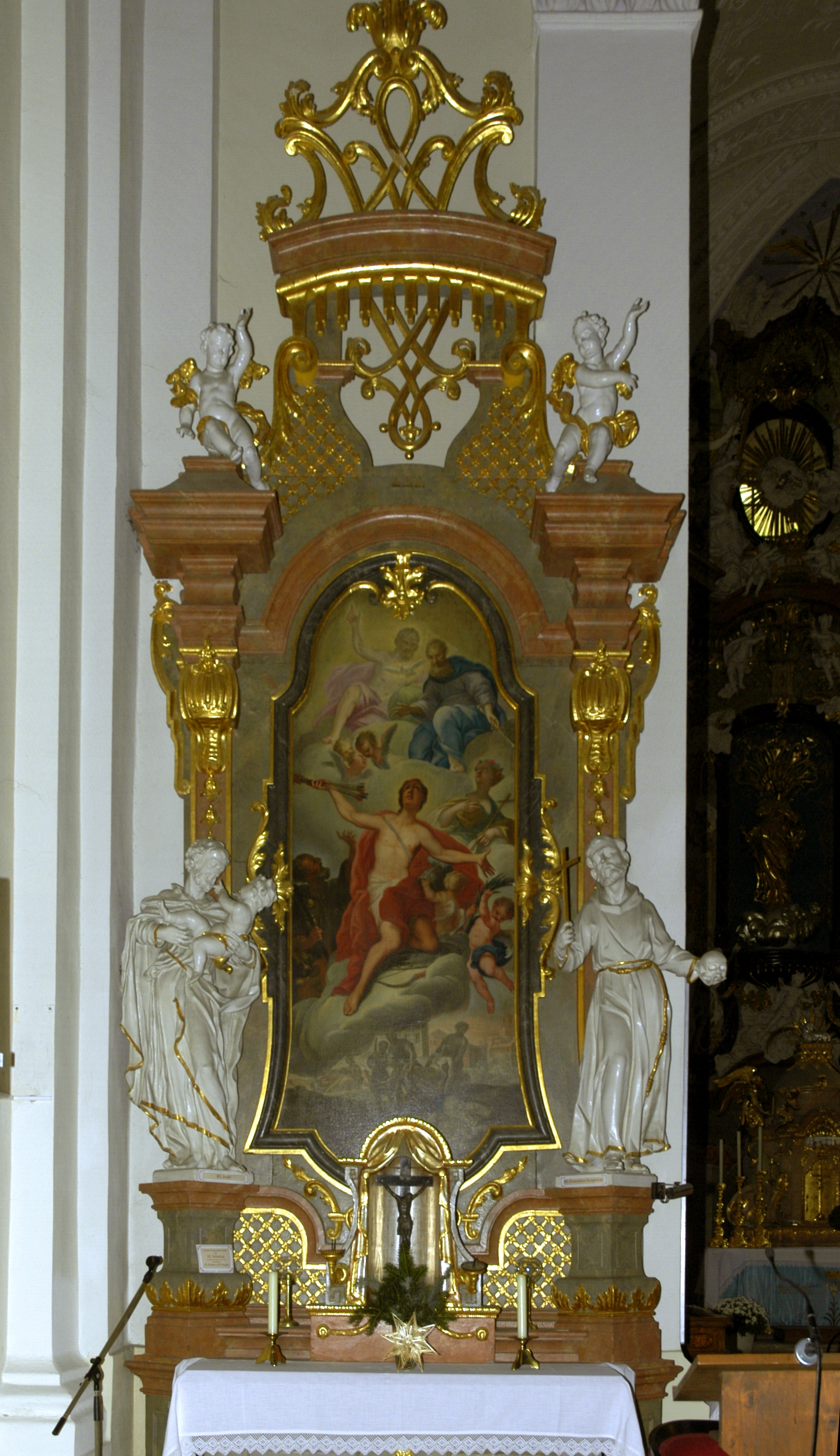 Kleiner Seitenaltar links in der katholischen Pfarrkirche Mariae Himmelfahrt in Ravelsbach